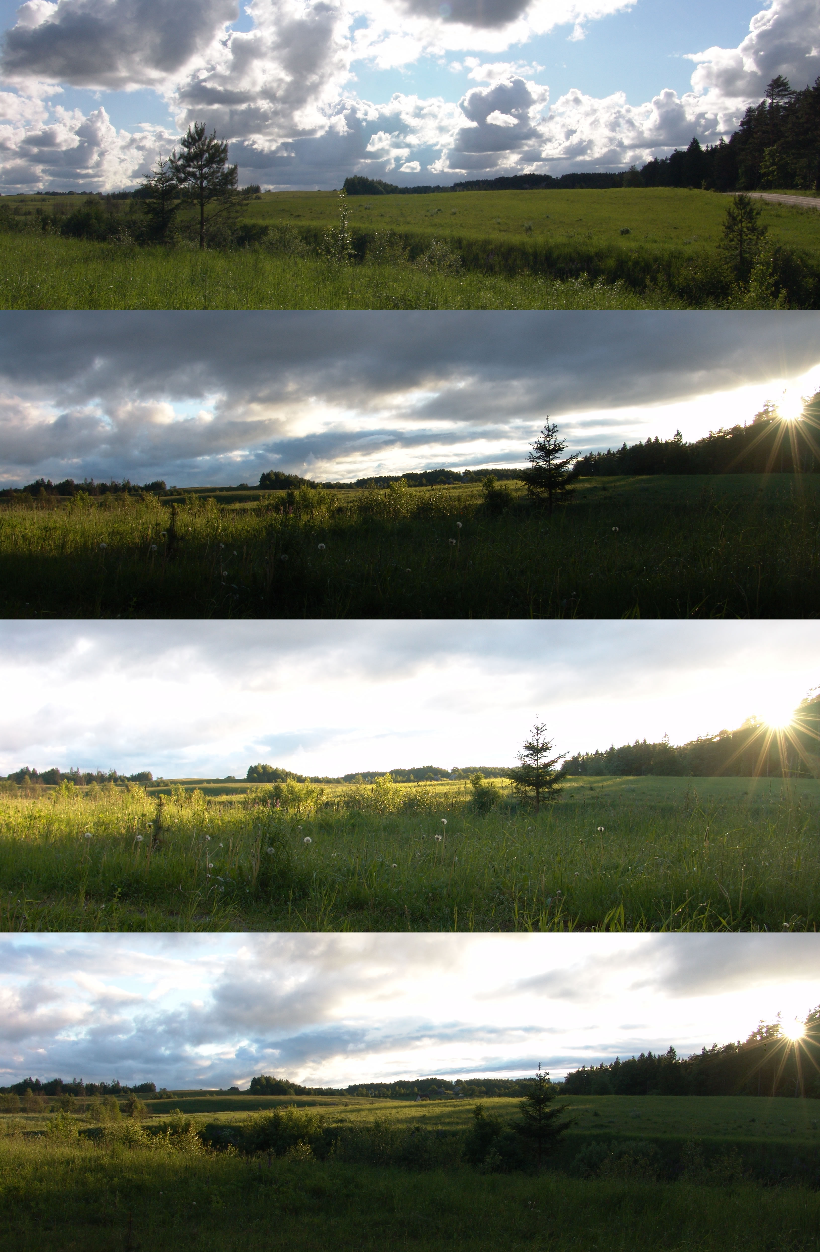 Wetterwechsel in wenigen Minuten